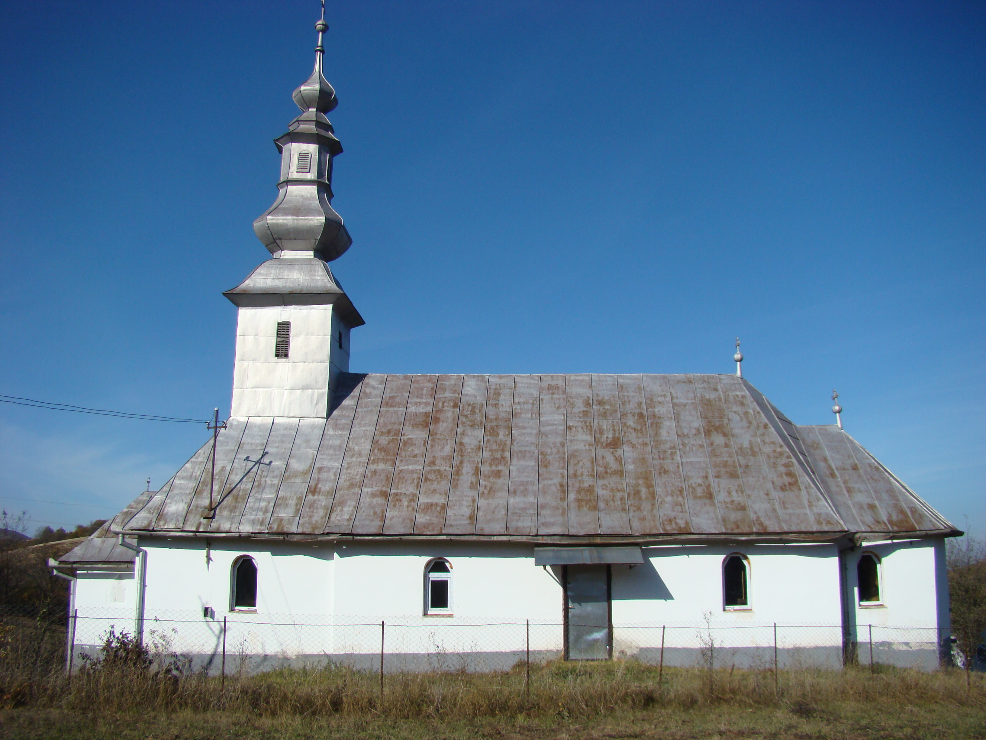 Biserica de lemn „Sființii Arhangheli Mihail şi Gavriil" din Colești, județul Bihor